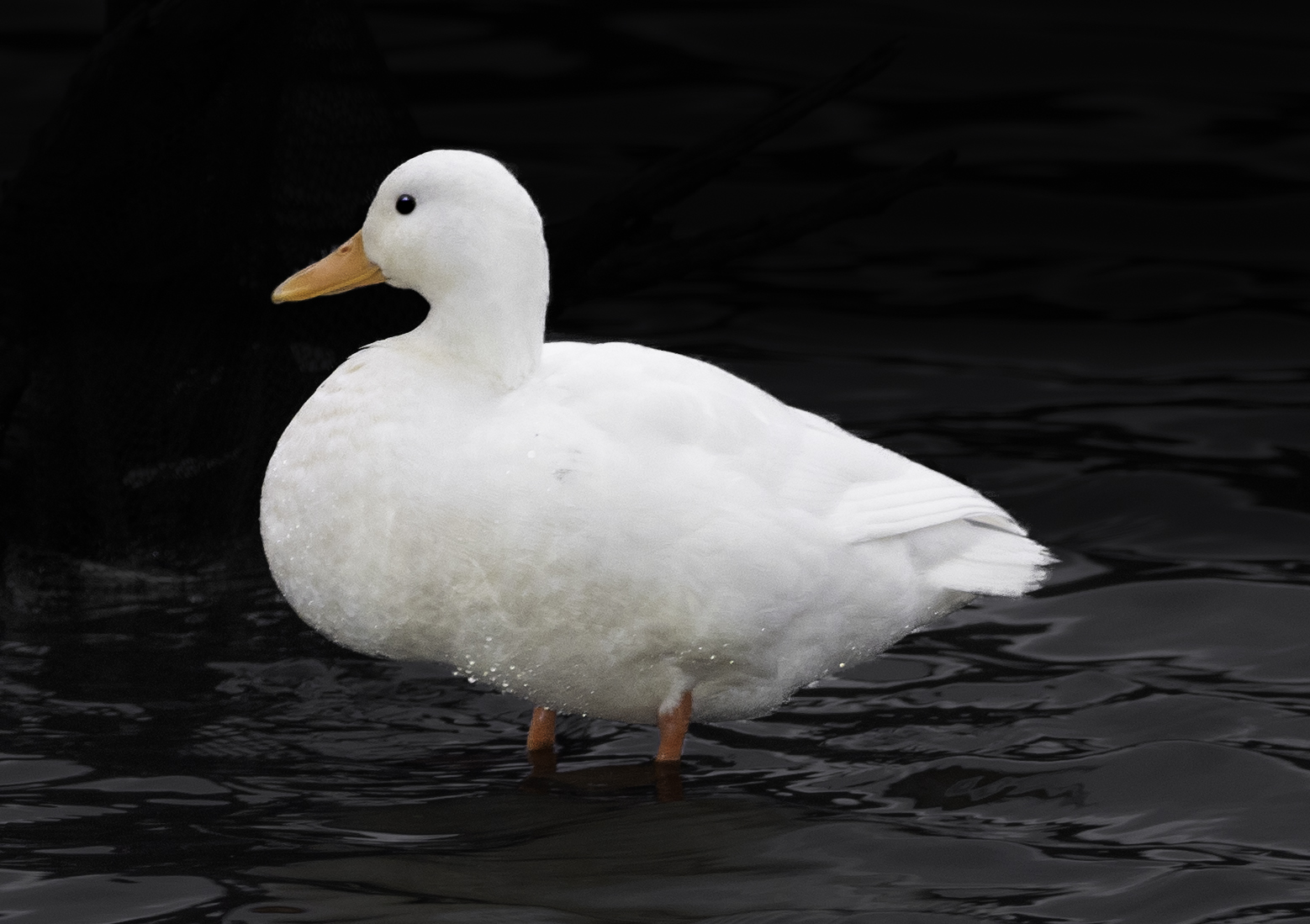 Bogesund, Stockholm, Sweden, October 2019